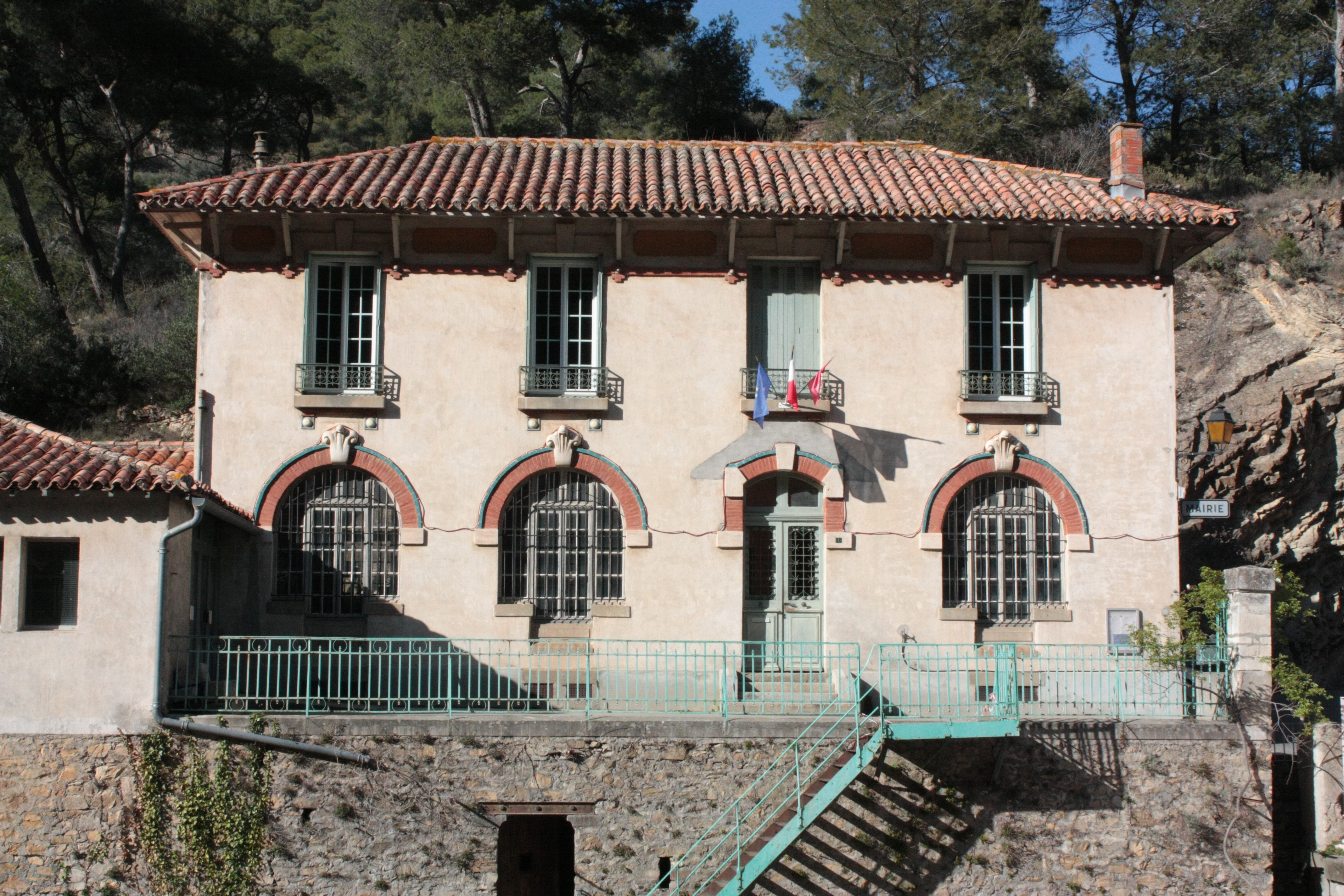 Mairie de Lastours.